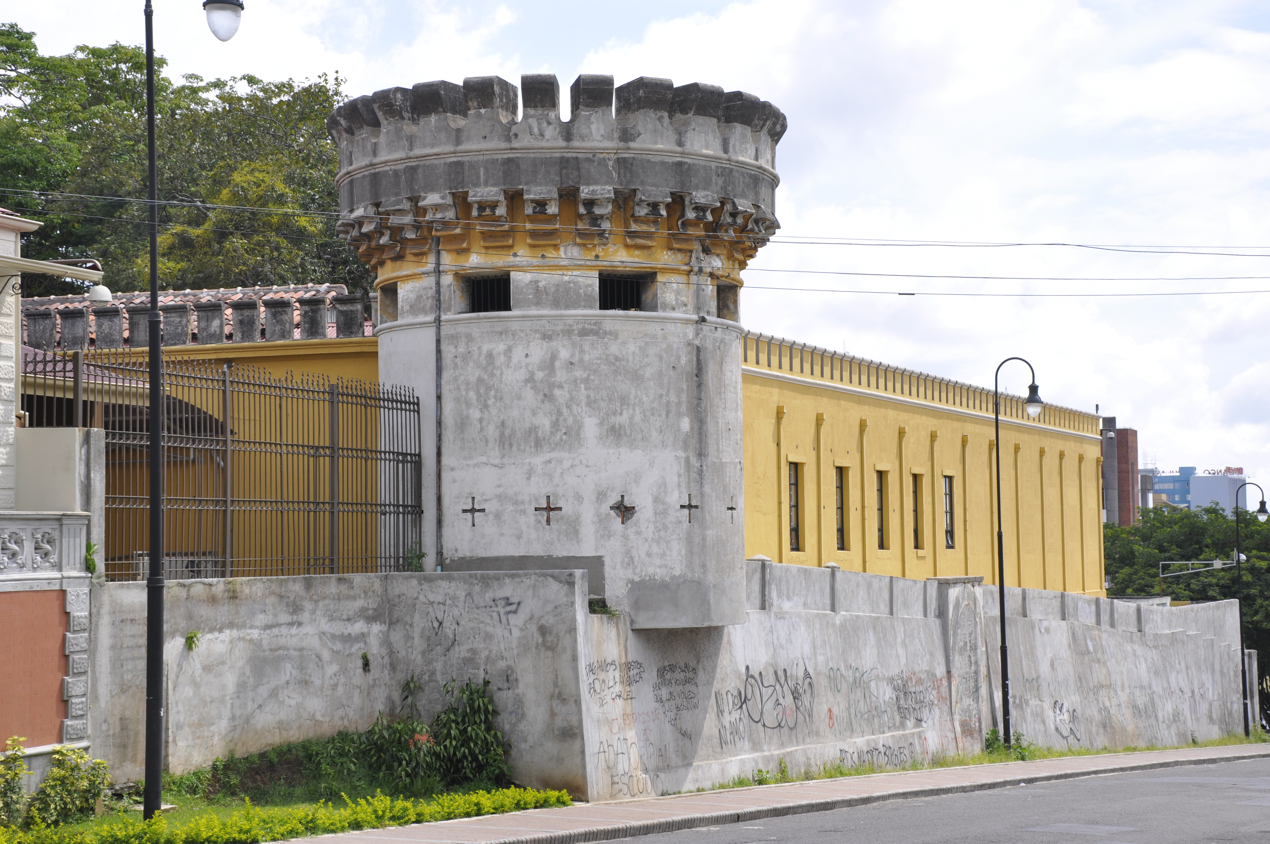 Torreón del Cuartel Bellavista, hoy Museo Nacional, Cuesta de Moras, San José, Costa Rica